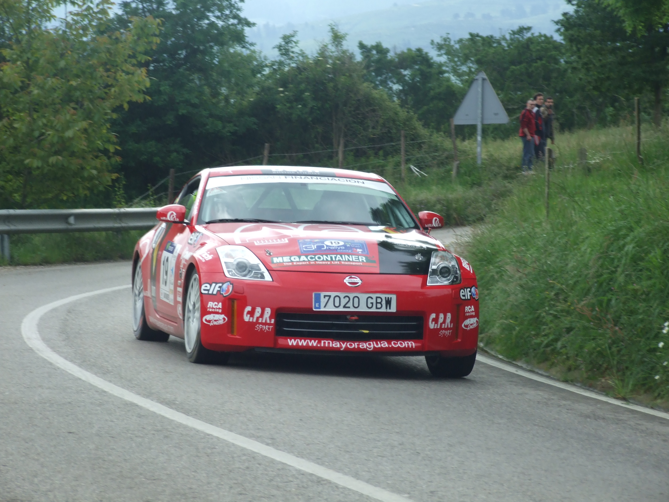 Rubén Gracia y Diego Sanjuan en un Nissan 350 Z en el Rallye Cantabria Infinita 2008 en Lloreda de Cayón